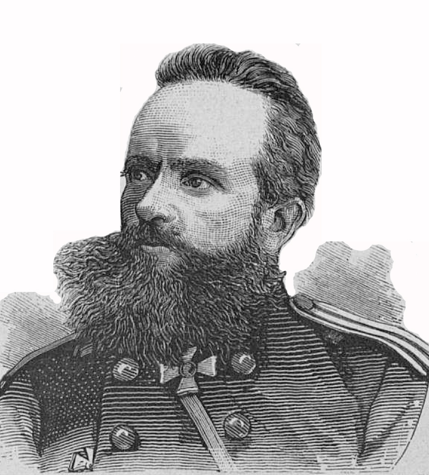 Бульмеринг, Евгений Михайлович, 1878 год Чин/звание: «Генерал-лейтенант» Знаки различия на картине: погоны «Полковник».